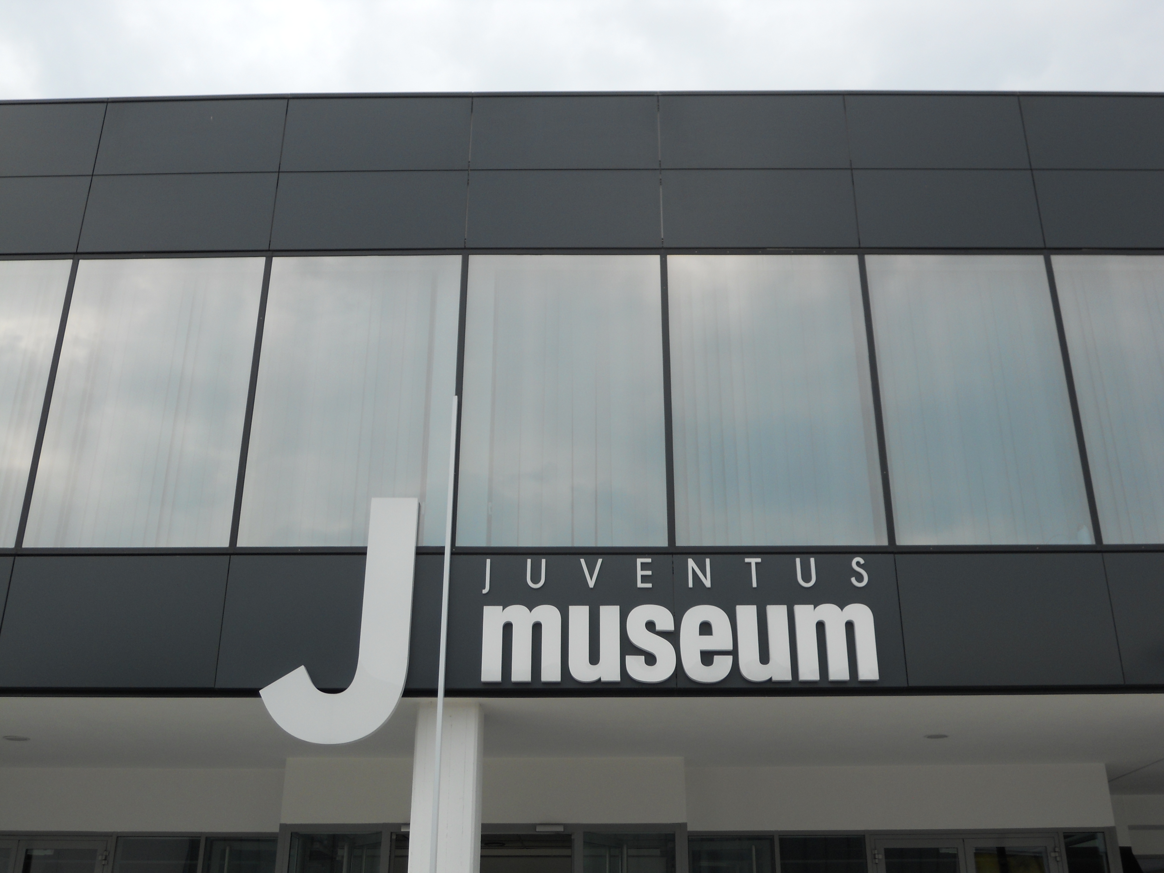 Ingresso del J-Museum (Juventus Museum) di Torino.